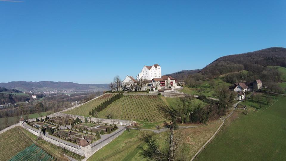 Blick auf Schloss Wildegg, Gemeinde Möriken-Wildegg